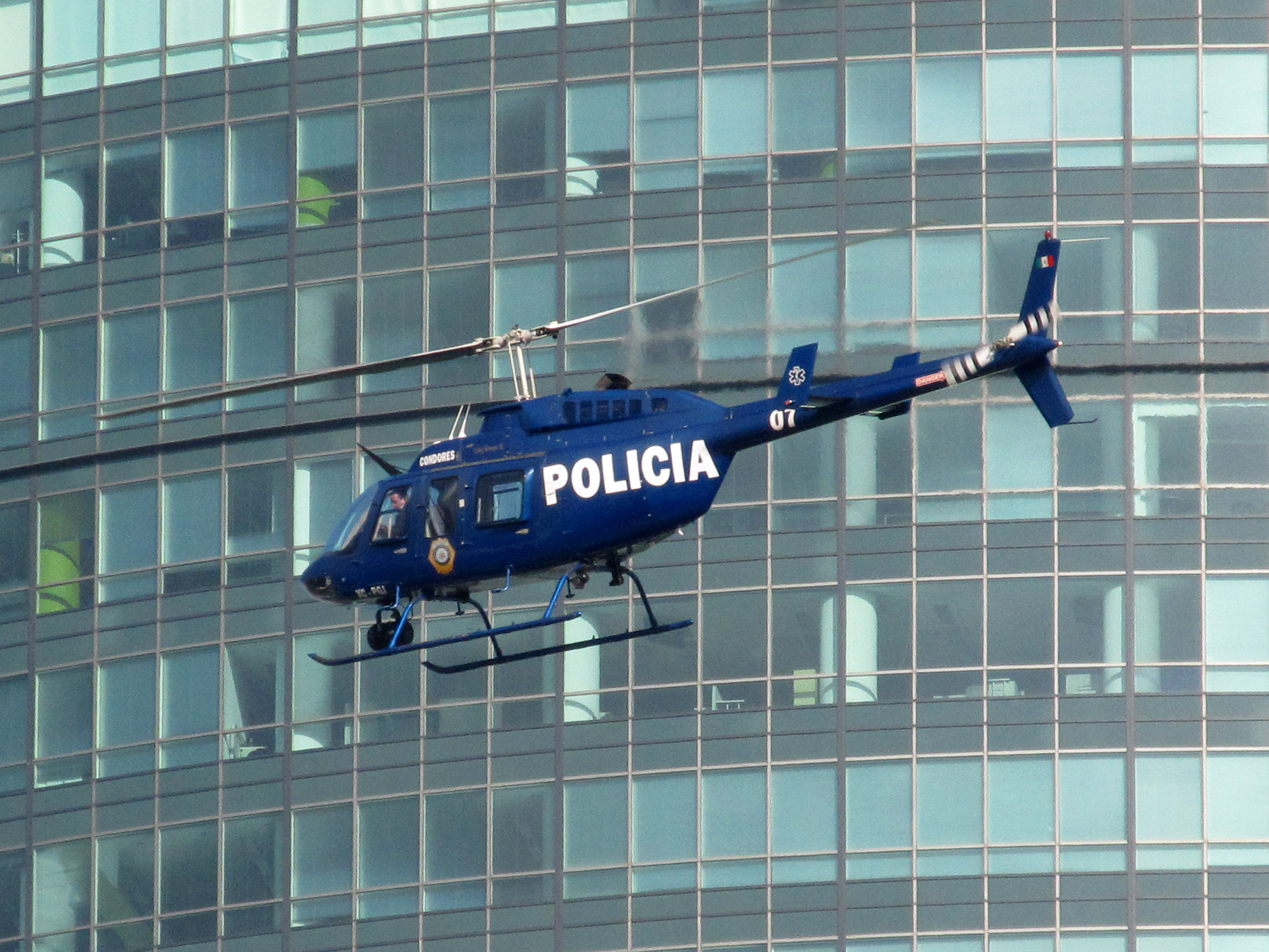 Helicóptero de la Policía de México